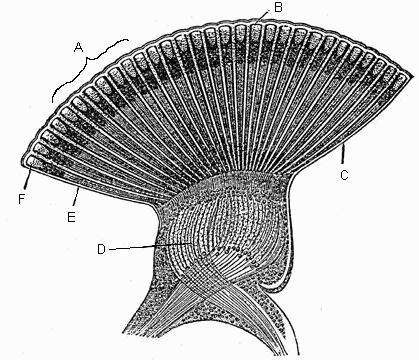 Oeil composé de libellule en coupe \ dragonfly compound eye